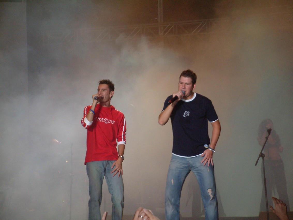 Concierto de Andy (izquierda) y Lucas (derecha) en Santa Cruz de la Palma, con motivo de la Bajada de la Virgen. 1 de junio de 2005.